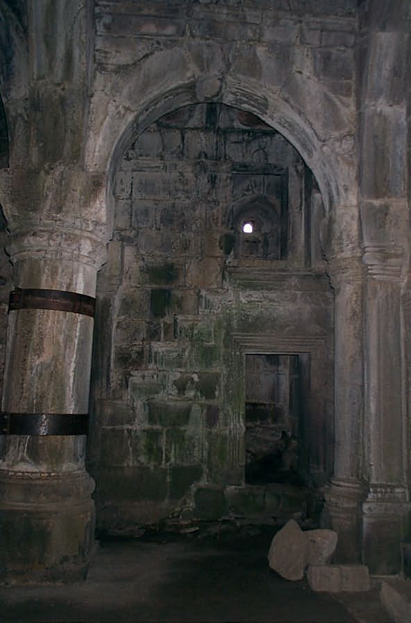 Makaravank Monastery in Armenia.